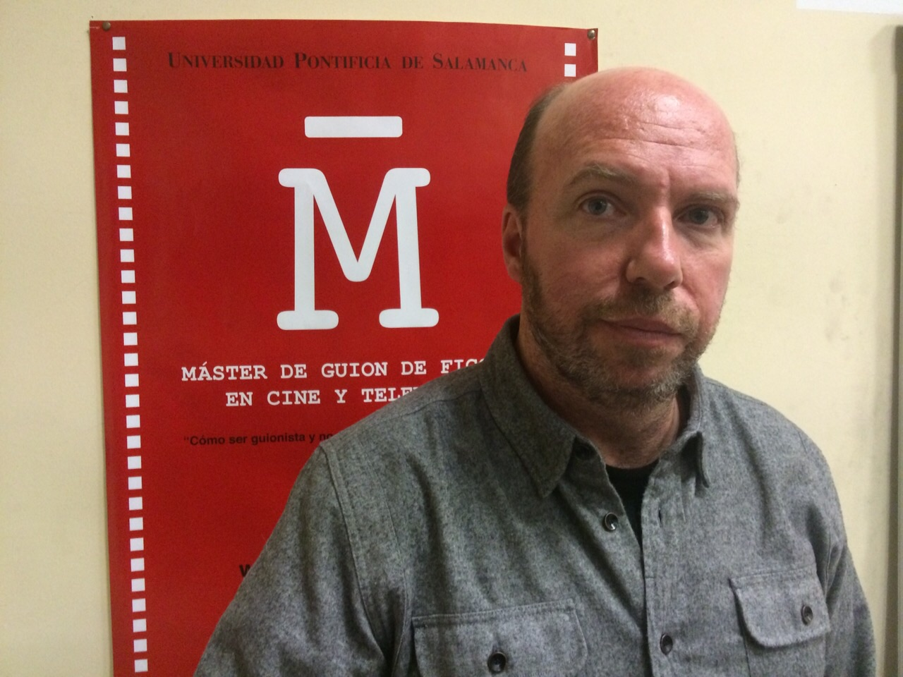 Foto de Jorge, guionista español de Alex de la Iglesia y Daniel Monzón.